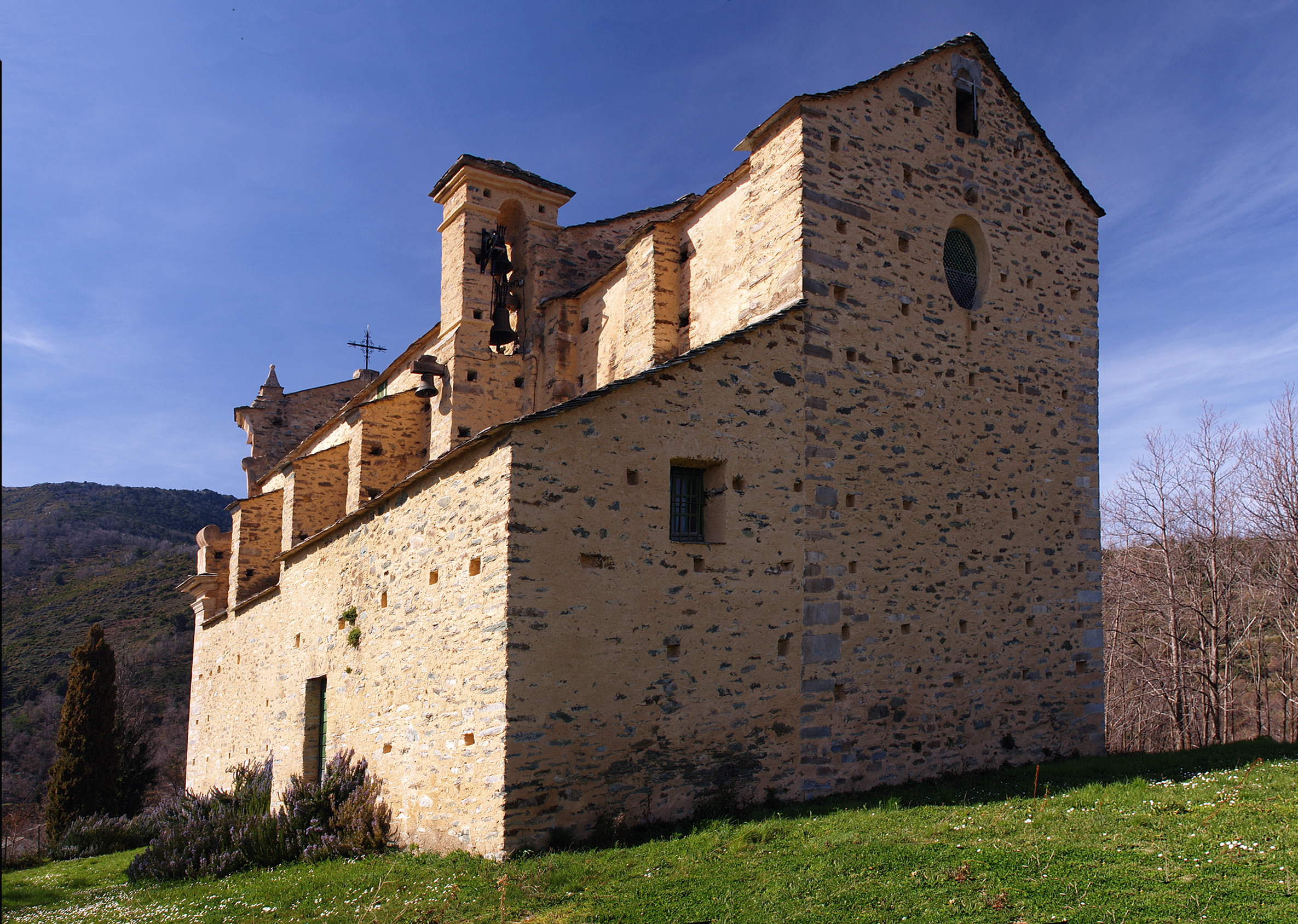 Giocatojo - Eglise San Quilico